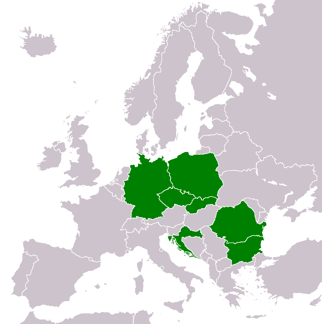 Kaufland in Europe